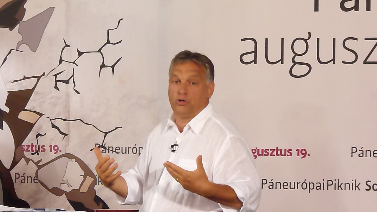 A felvétel 2014. augusztus 19-én készült Sopronpusztán. A Páneurópai Piknik 25. évfordulója. ©© Derzsi Elekes Andor, Budapest 2014, You are authorised to use these photos and vids under Creative Commons – even for commercial, for profit purposes. Photos must be attributed to Derzsi Elekes Andor. All of the photos and vids in the Metapolisz DVD line are under Creative Commons and can be used even for commercial – for profit – purposes. Recommended Citation Derzsi Elekes Andor: Metapolisz DVD line